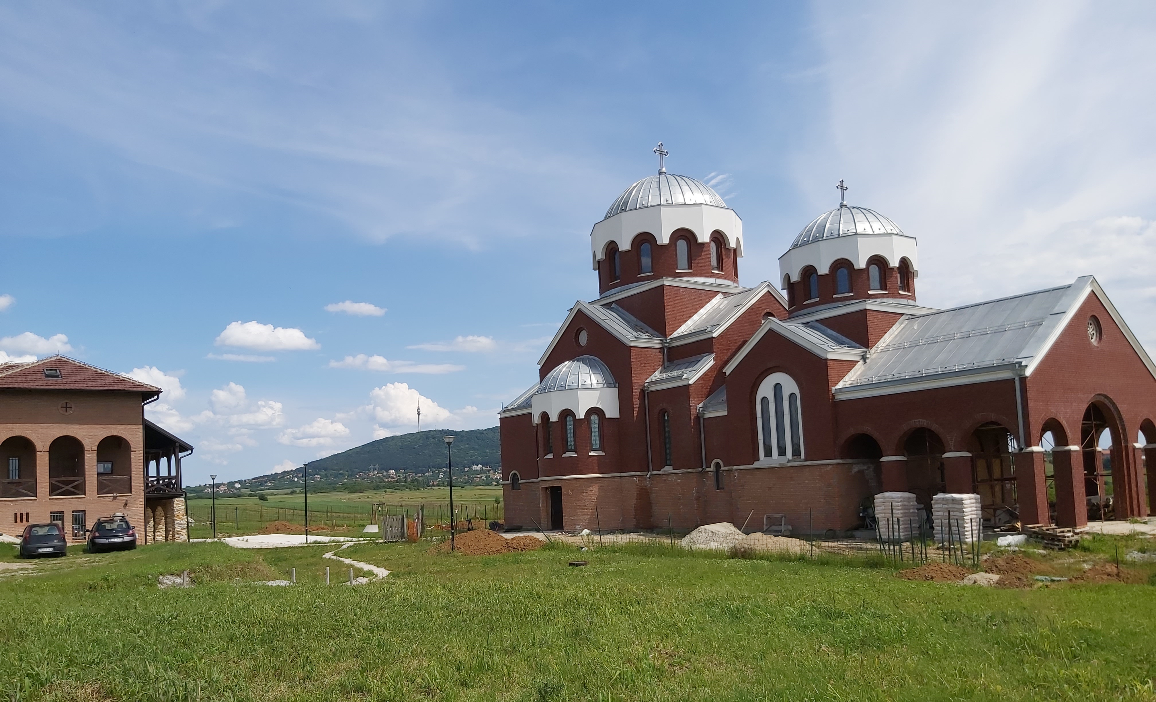 Црква Светог Владике Николаја Жичког у Реснику